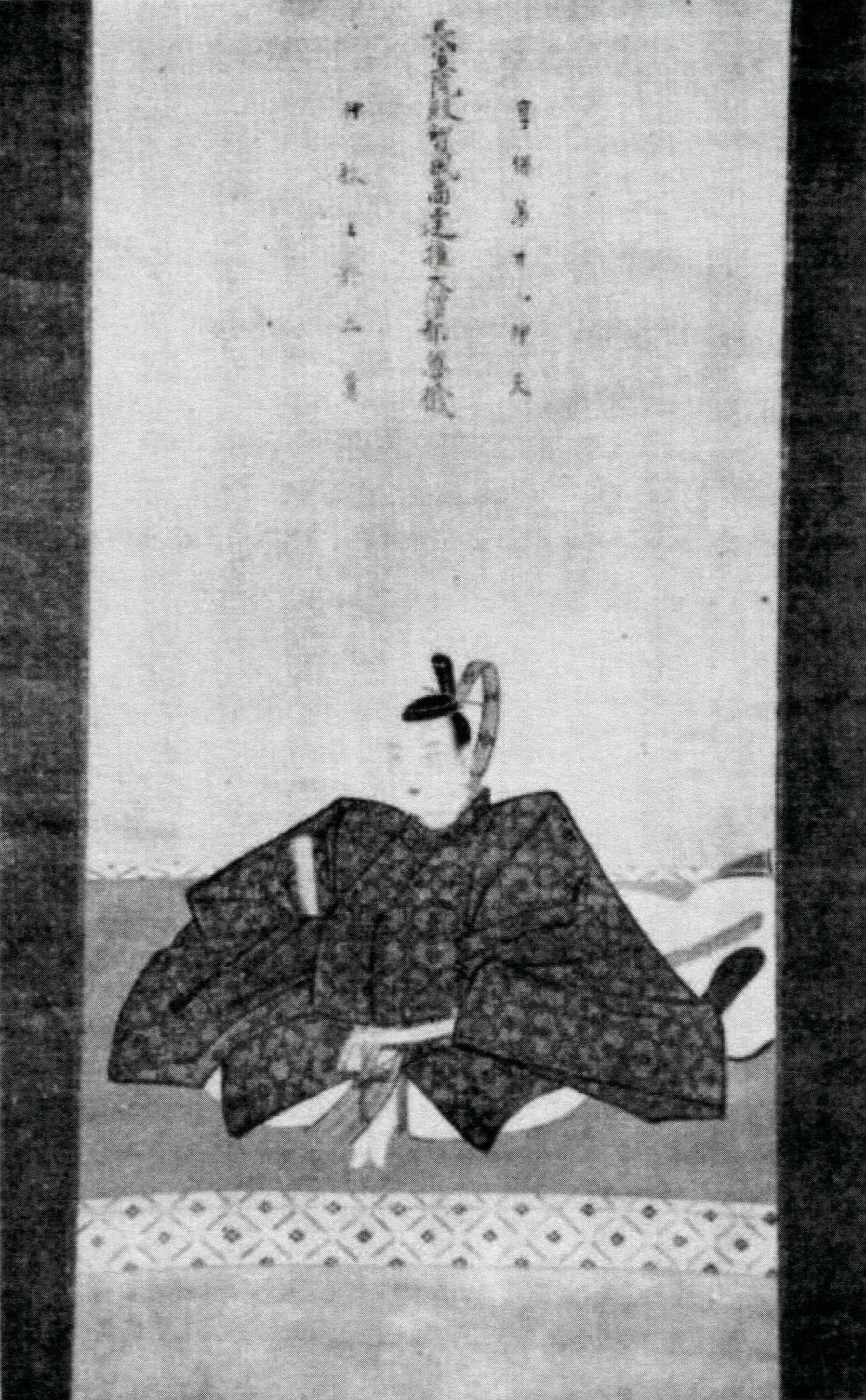 藤堂高治の肖像(モノクロ)。